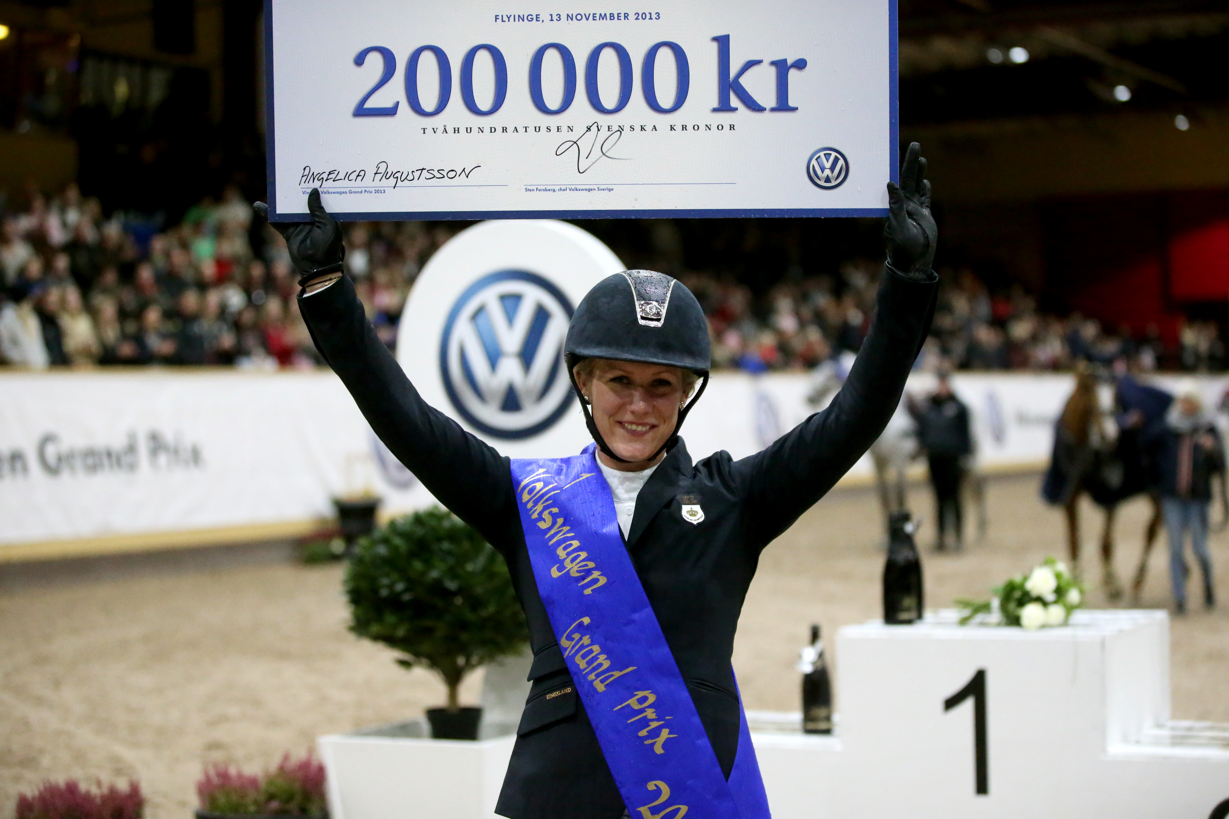 Hoppryttaren Angelica Augustsson och hästen Mic Mac du Tillard efter vinsten i Volkswagen Grand Prix Final 2013 på Flyinge.